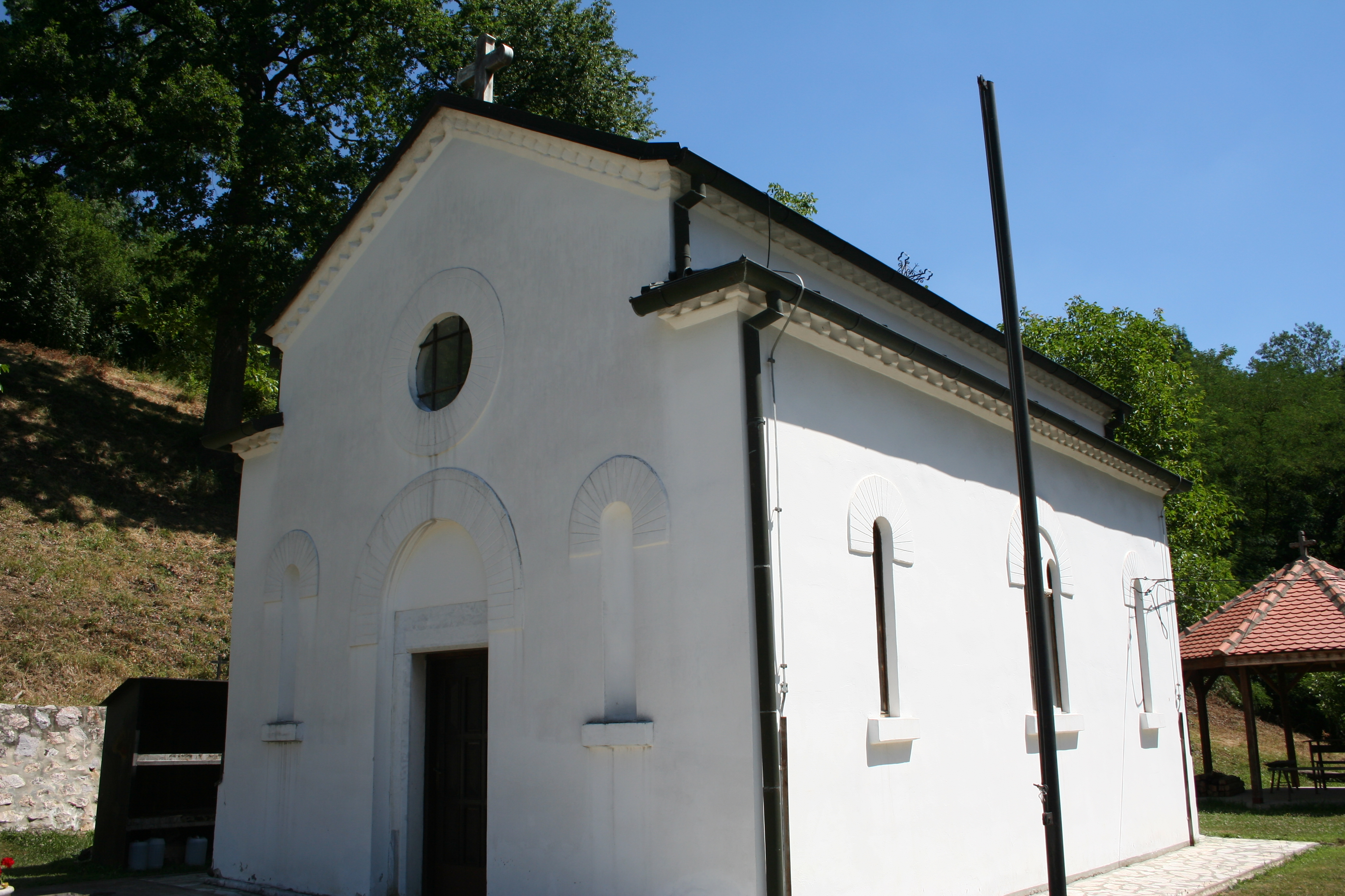 Spomen crkva Sv. Đorđa manastira Ćelije